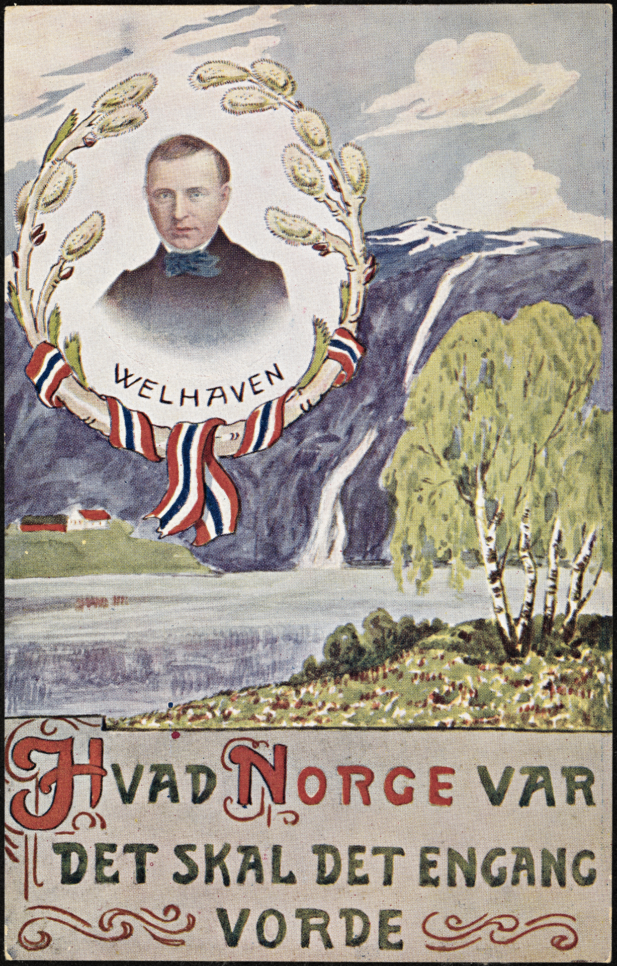 Tittel / Title: Hvad Norge var det skal det engang vorde Motiv / Motif: Postkort. Johan Sebastian Welhaven (1807-1873) Dato / Date: utgitt 1914 / published 1914 Kunstner / Artist: ukjent / unknown Utgiver / Publisher: Kølbelske kunsttrykkeri Eier / Owner Institution: Nasjonalbiblioteket / National Library of Norway Lenke / Link: Bildesignatur / Image Number: blds_04860